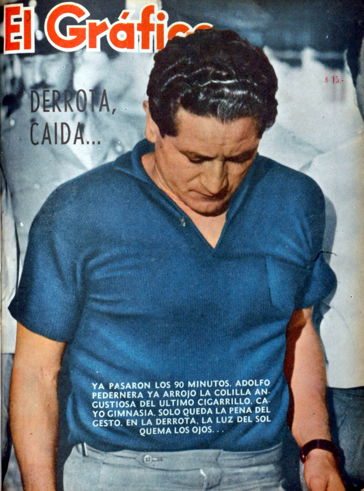 El Grafico del 28 de Noviembre de 1962. Edicion 2251